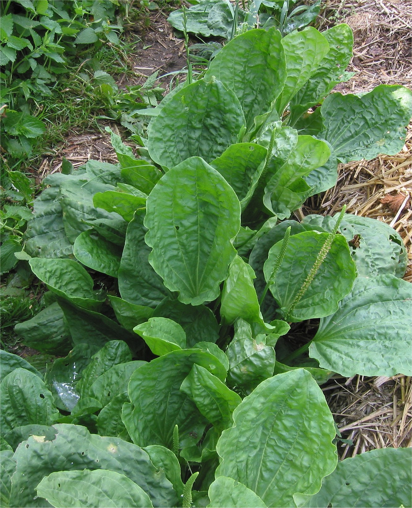 (nl: Grote weegbree planten) Plantago major subsp. major